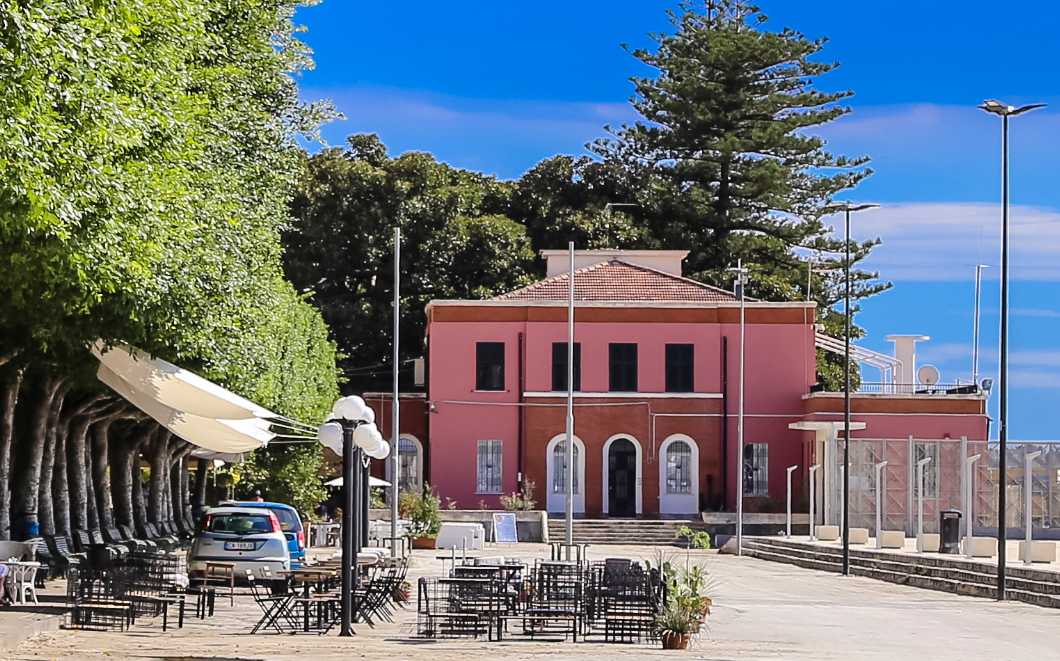 Villetta Aretusa, ritaglio di: Villetta Aretusa, Foro Italico, Ortigia.jpg